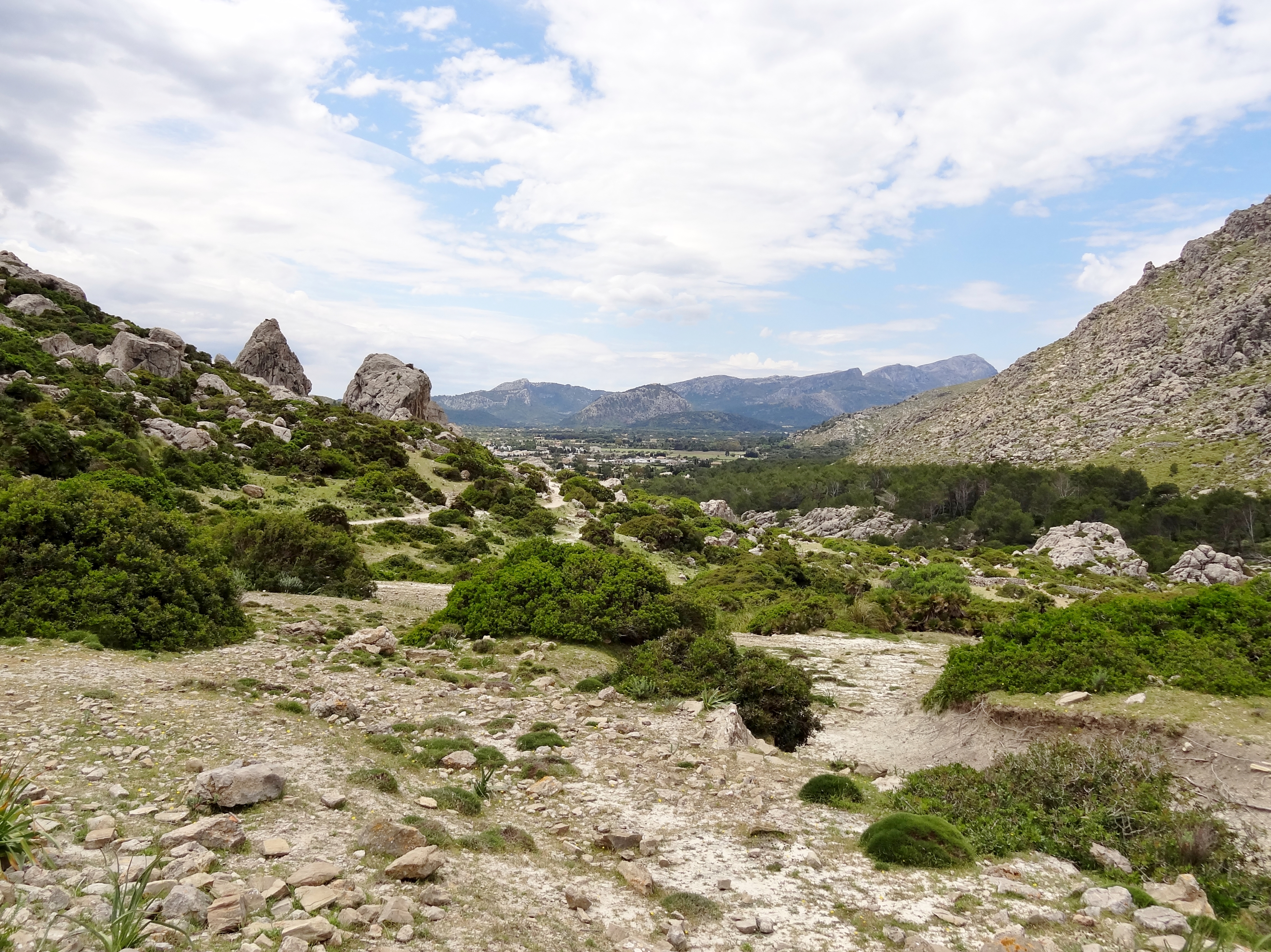 Vall de Bóquer in der Gemeinde Pollença, Mallorca, Spanien